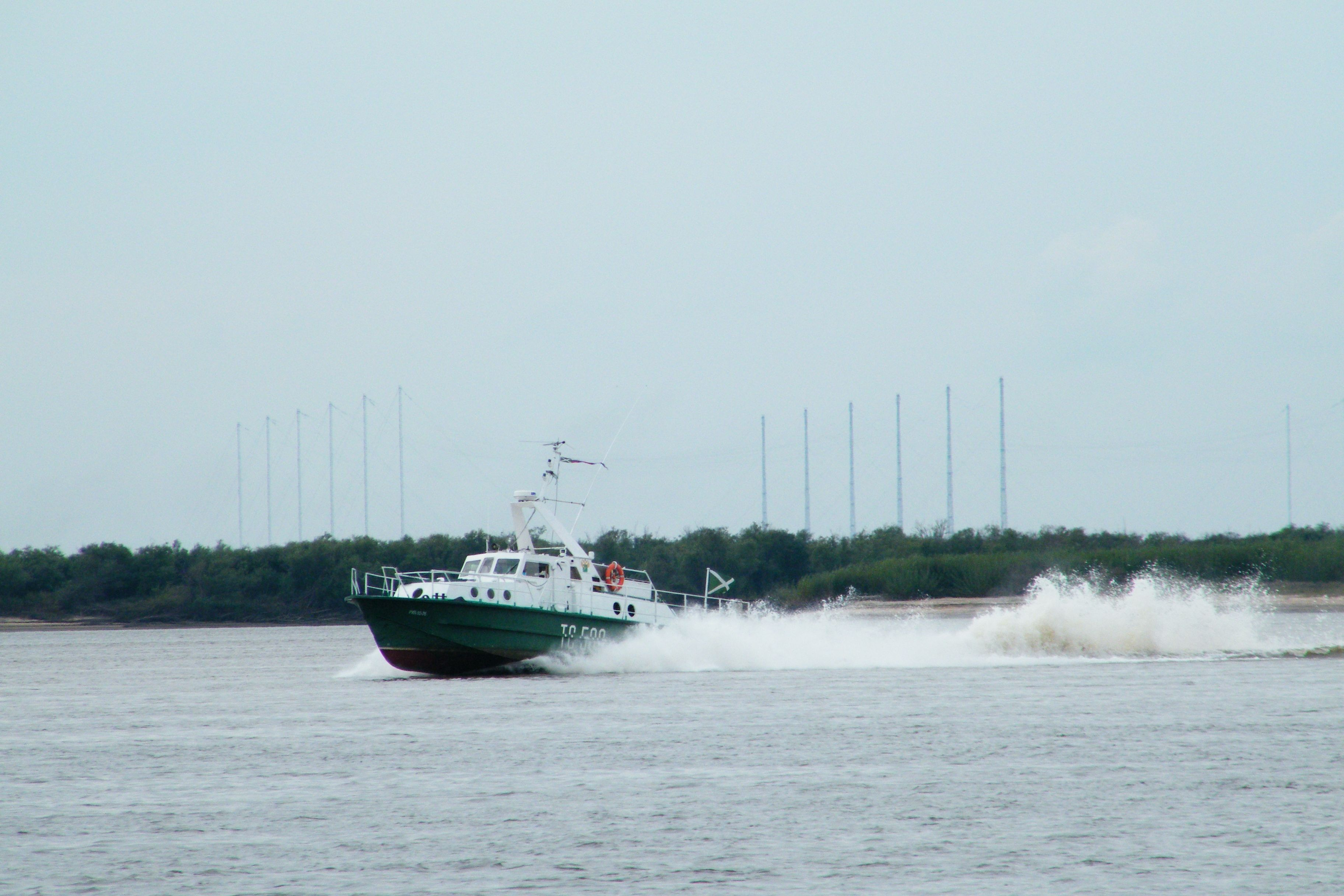 Катер Сайгак-М Амурской пограничной флотилии